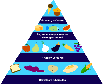 La presente imagen representa la piramide de los alimentos recomendada para una dieta equilibrada